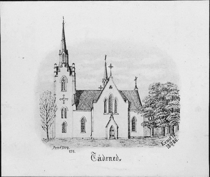 Kyrkan från söder, efter teckning av Ernst Wennergren, 1886. Kategori: (01) ExteriörerKyrkan från söder, efter teckning av Ernst Wennergren, 1886.